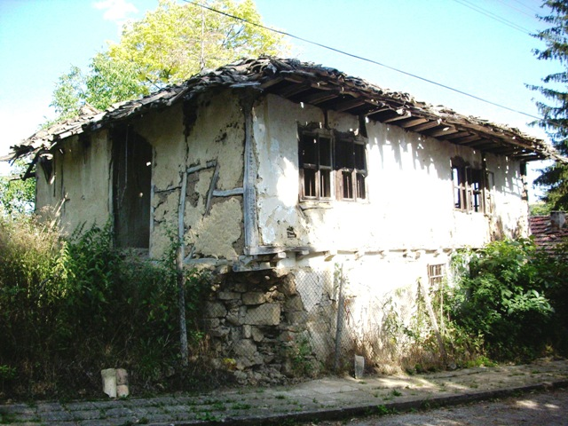 Стара къща от централната част на село Иванча, Поповско - юли 2008 год. Фото: Вл. Стойков